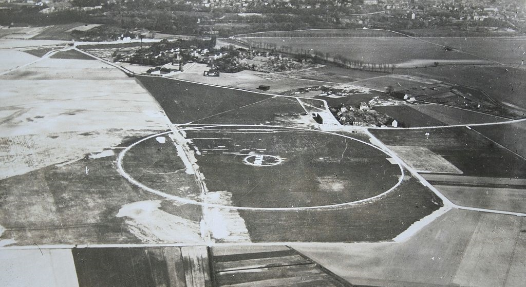 Aus der Luft fotografiertes Bild des Flugplatzes